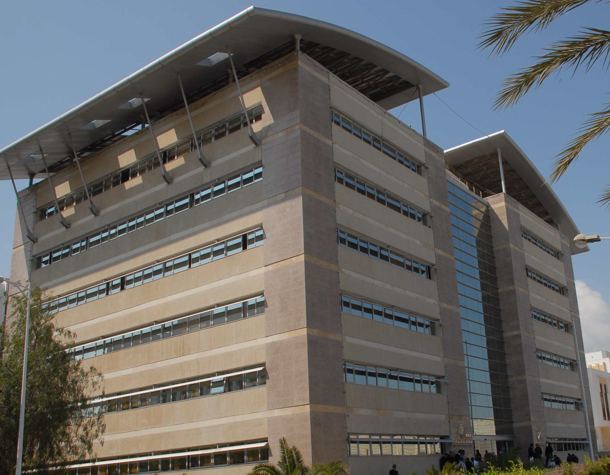 Siège de l'ATCT (à gauche) et la FIPA (à droite)